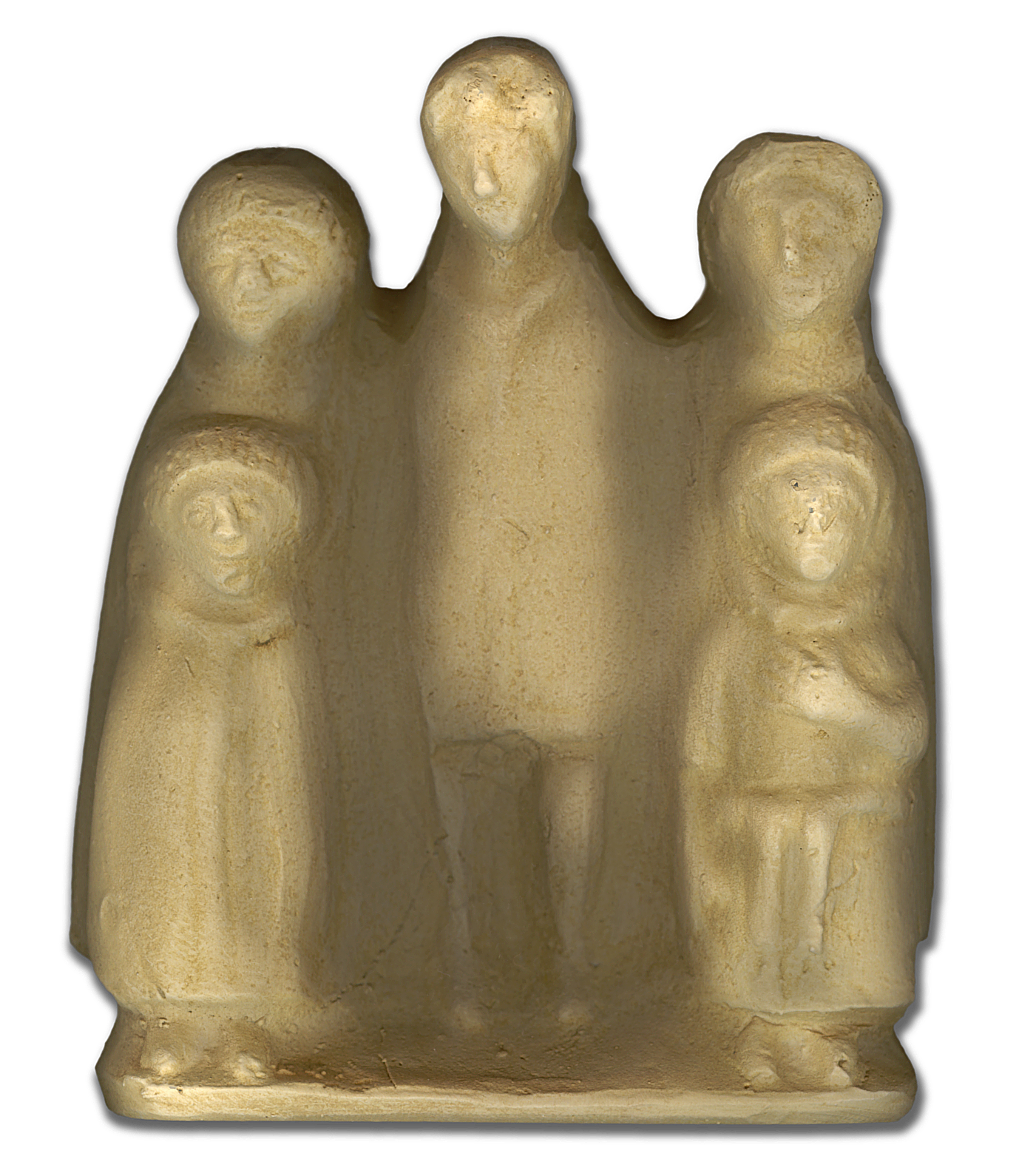 Köln, Römisch Germanisches Museum: provinzialrömische Familie, Ton.